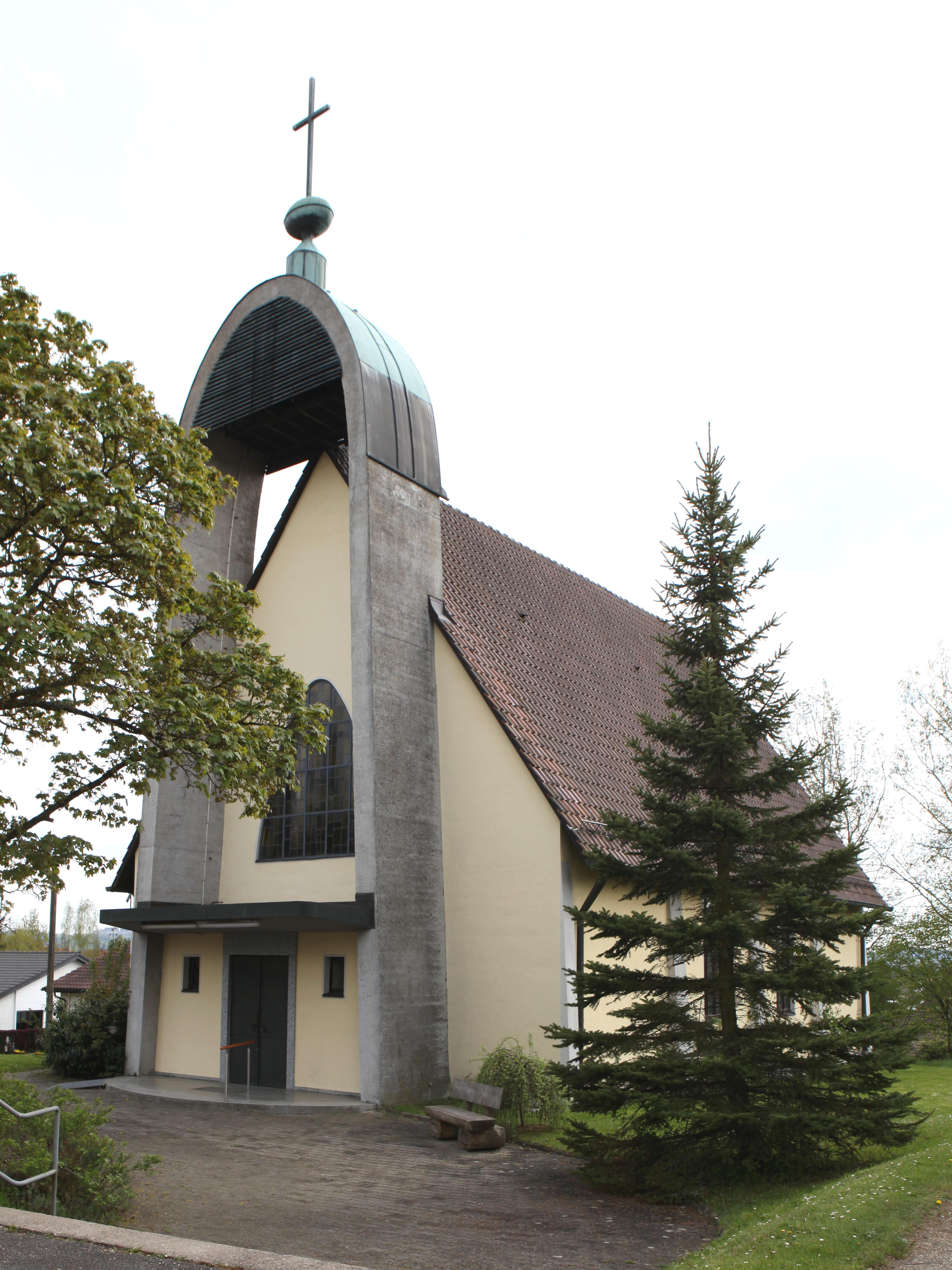 Oberlauter St. Bonifatius